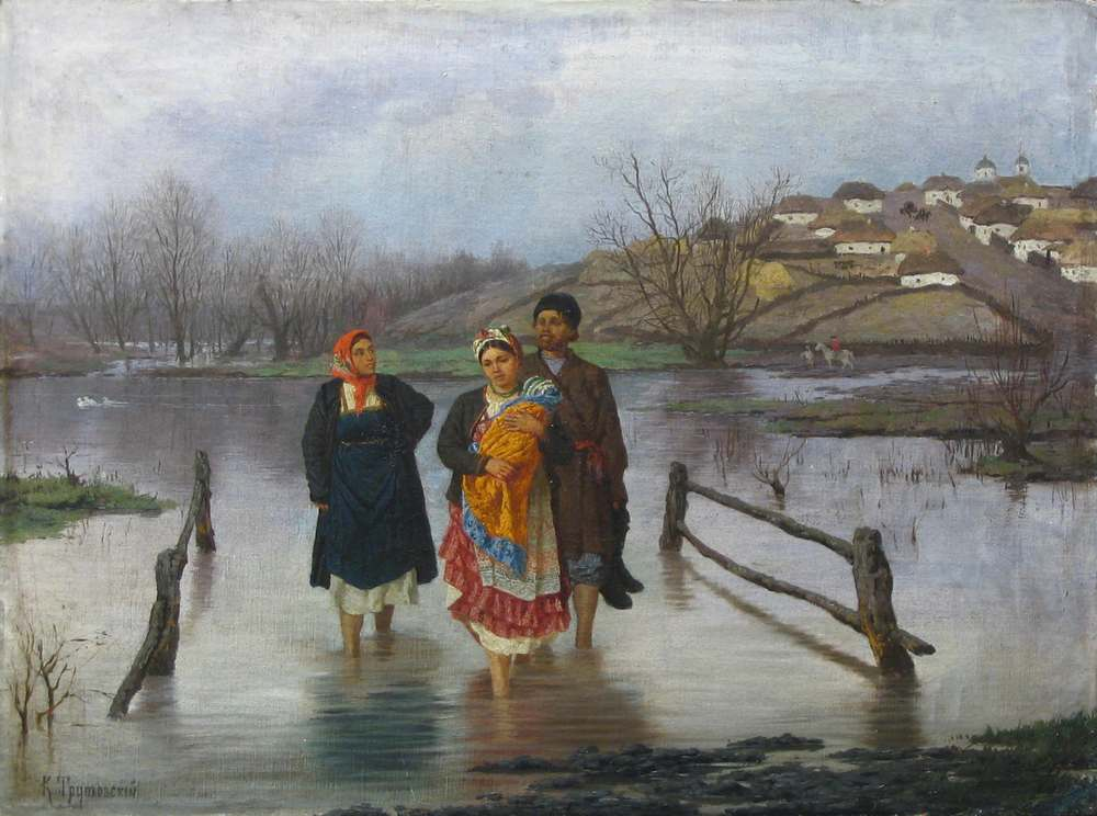 Трутовский, Константин Александрович. В половодье. Ранее 1893 г. Холст, масло. 49 х 65,5. Курская государственная картинная галерея имени А.А. Дейнеки